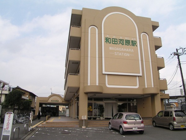 Wadagahara Station, on the Izuhakone Daiyūzan Line, Minamiashgara, Kanagawa 和田河原駅